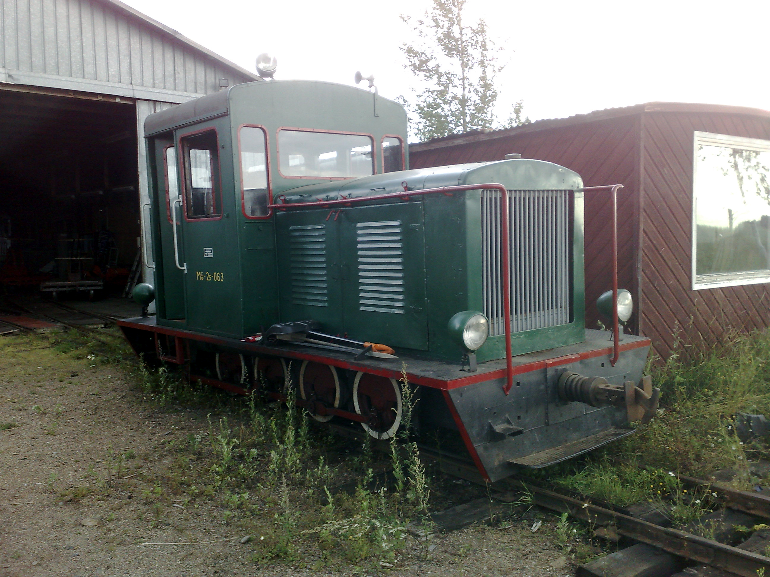 HKR:n Move21-veturi kesällä 2008